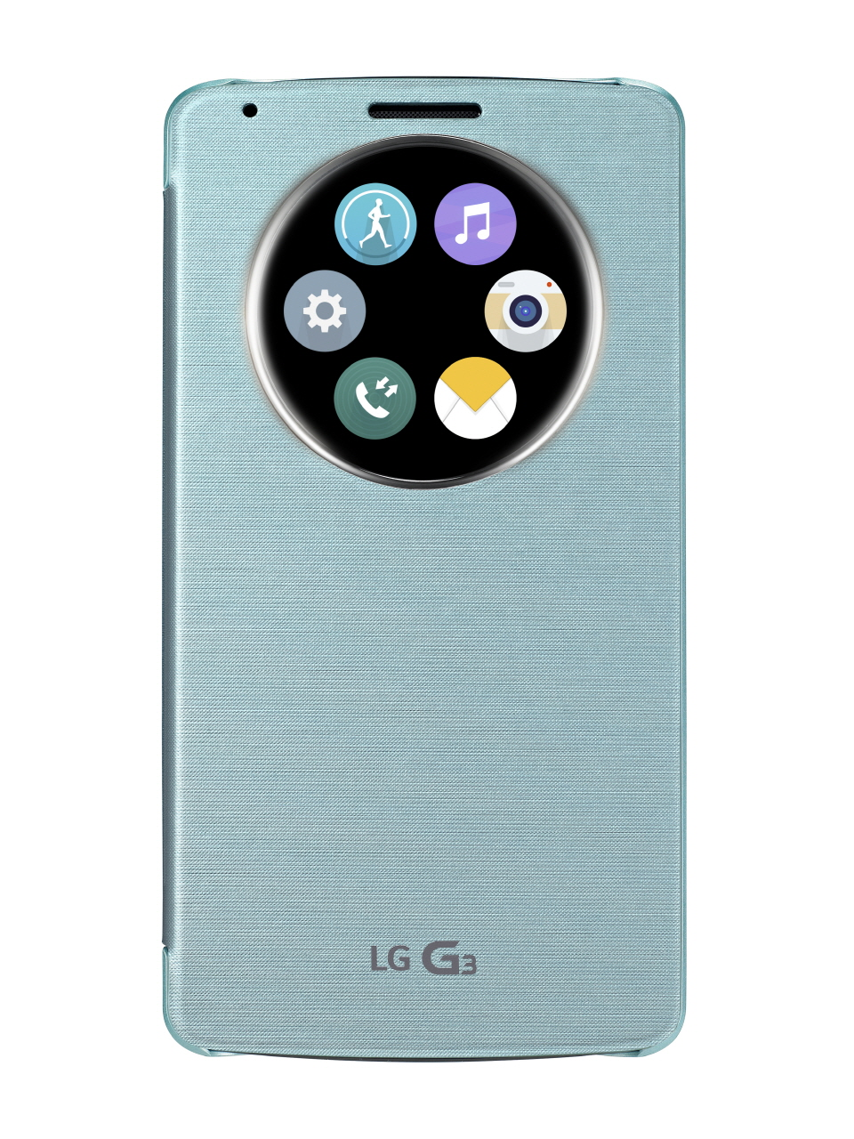 ■ 커버를 열지 않아도 원형 윈도우에서 전화, 문자, 음악, 카메라, 헬스, 시계 등 6가지 기능 퀵(Quick) 실행 ■ 세련된 원형 윈도우와 휴대폰 옆면 보호기능 적용한 디자인 ■ 원형 윈도우 라인을 따라 LCD 빛을 내는 ‘스마트 라이팅’ ■ 블랙, 화이트, 골드, 아쿠아, 핑크 등 5가지 색상과 무선 충전 지원 ※ Social LG전자 에서 관련 보도자료를 확인하실 수 있습니다.